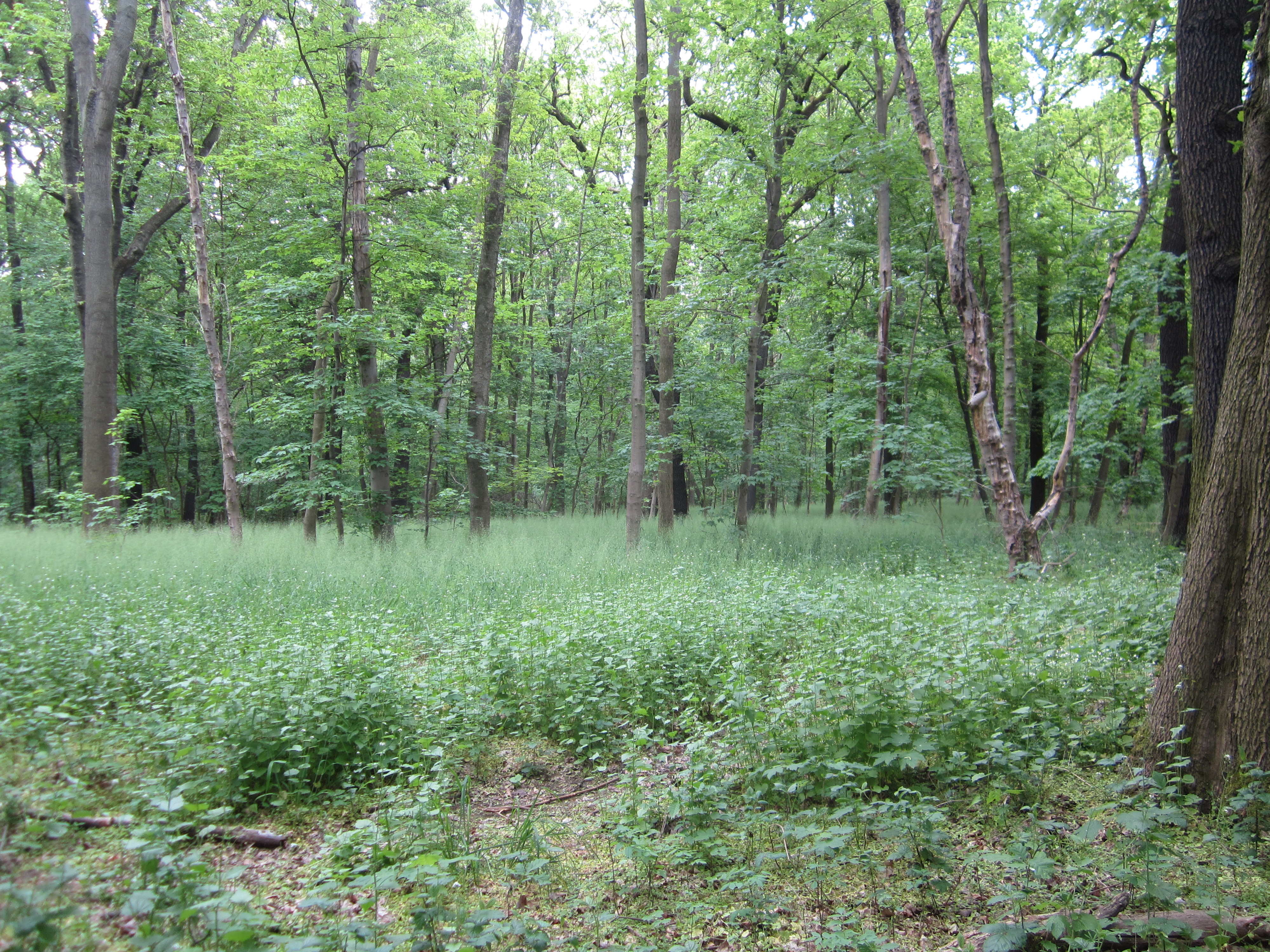 FFH-Gebiet 4539-301 Brösen Glesien und Tannenwald in Leipzig; Waldboden mit Krautbestand